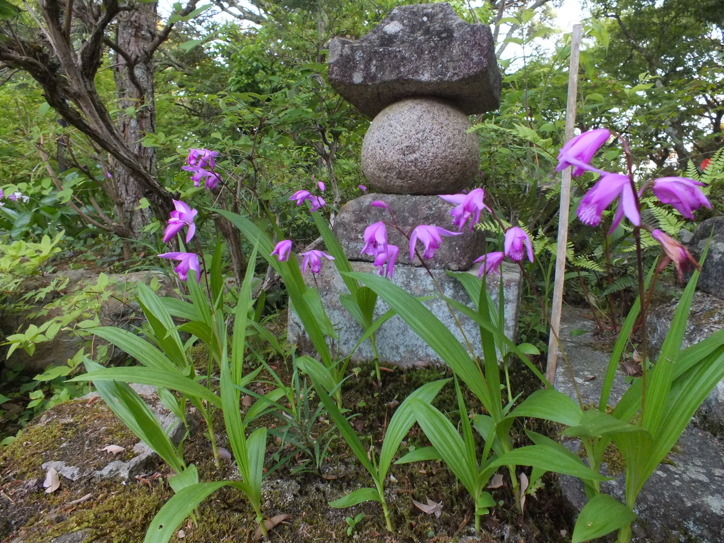 Bletilla striata Mudou-ji 無動寺